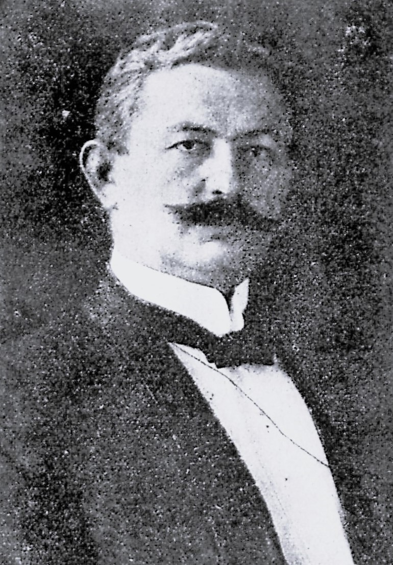 Dr. Ernst Meyer-Lüerssen, bevollmächtigter Minister in Berlin und stellvertretendes Mitglied des Reichsrates.